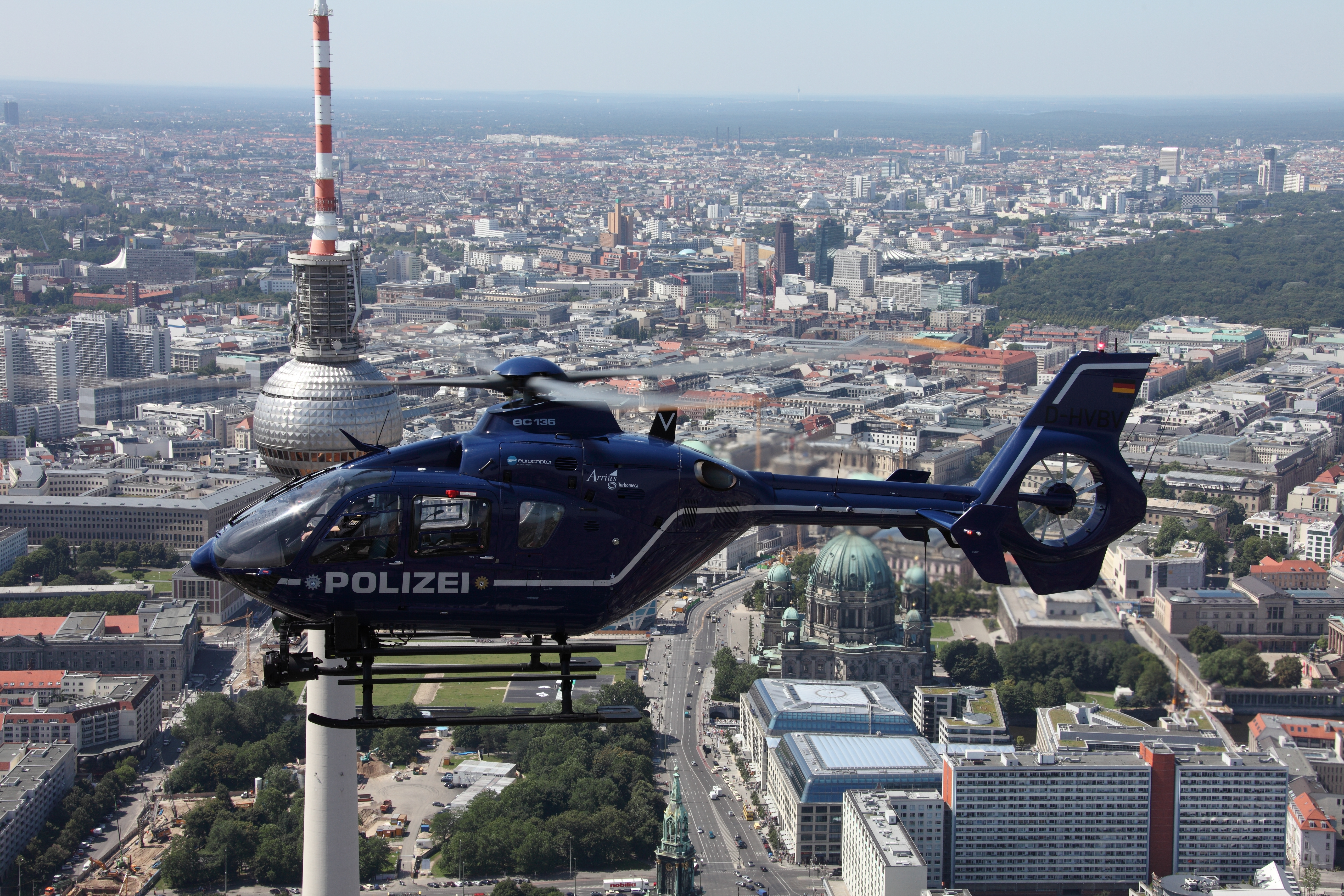 Polizeihubschrauber Polizei Berlin Eurocopter EC 135, beim Vorbeiflug am Berliner Fernsehturm